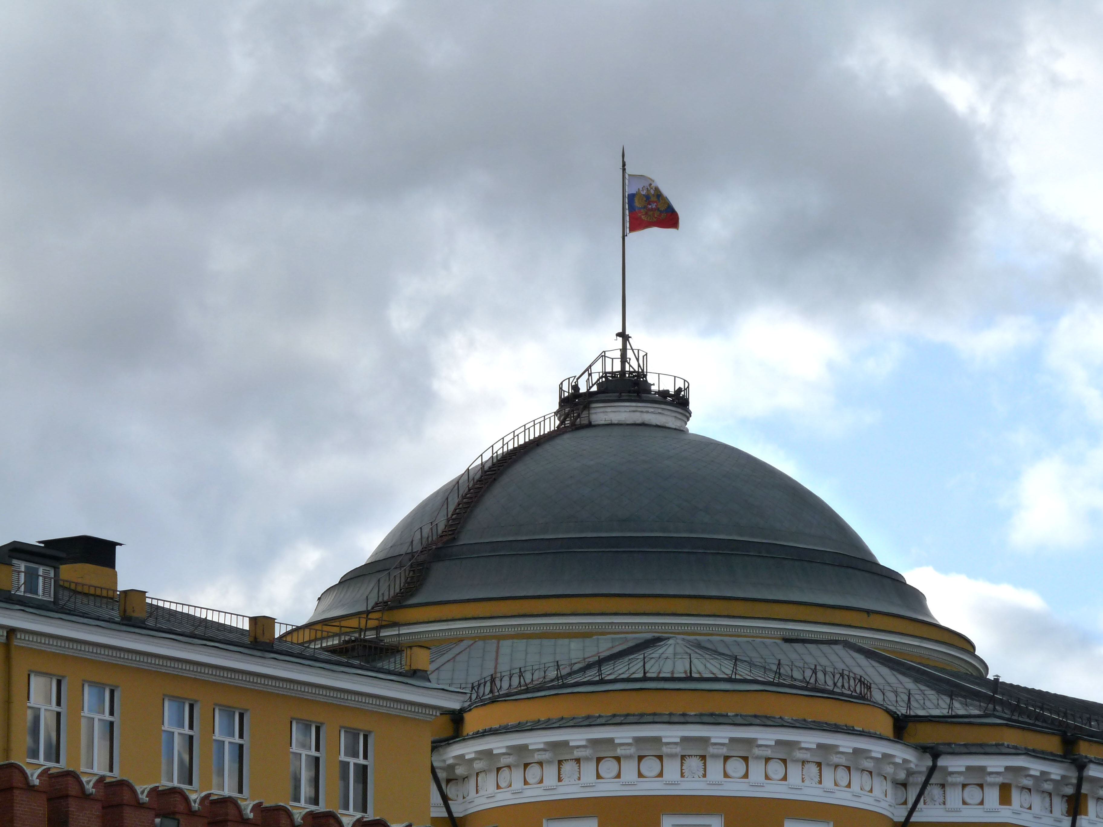 Red Square Kremlin Senate 02